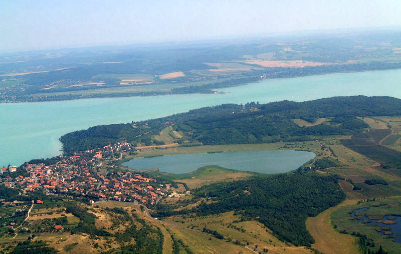 Sármellék. Tihanyi-félsziget. Полуостров Тихань. Fotó: Victor Belousov.